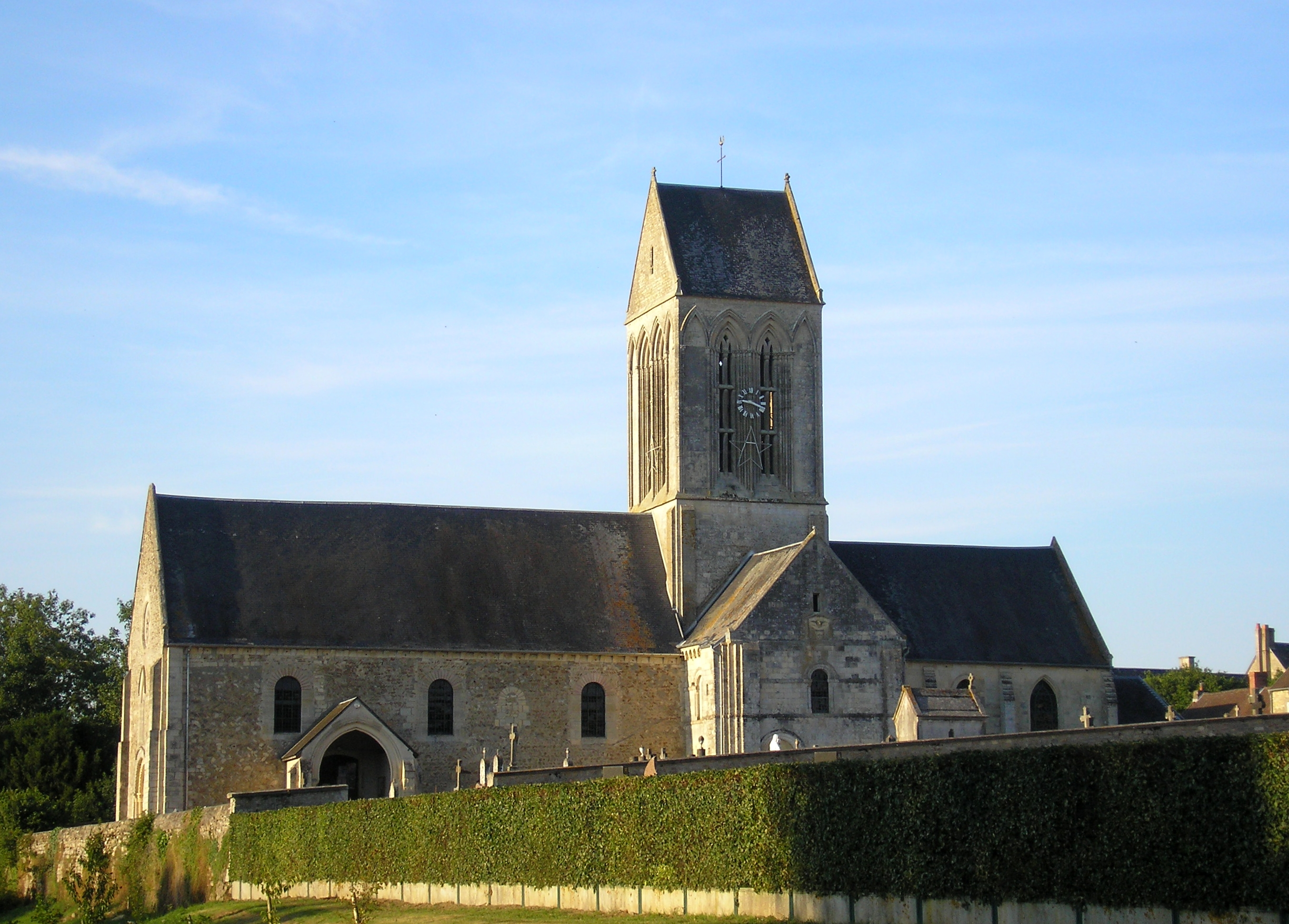 Tilly-sur-Seulles (Normandie, France). L'église Saint-Pierre.